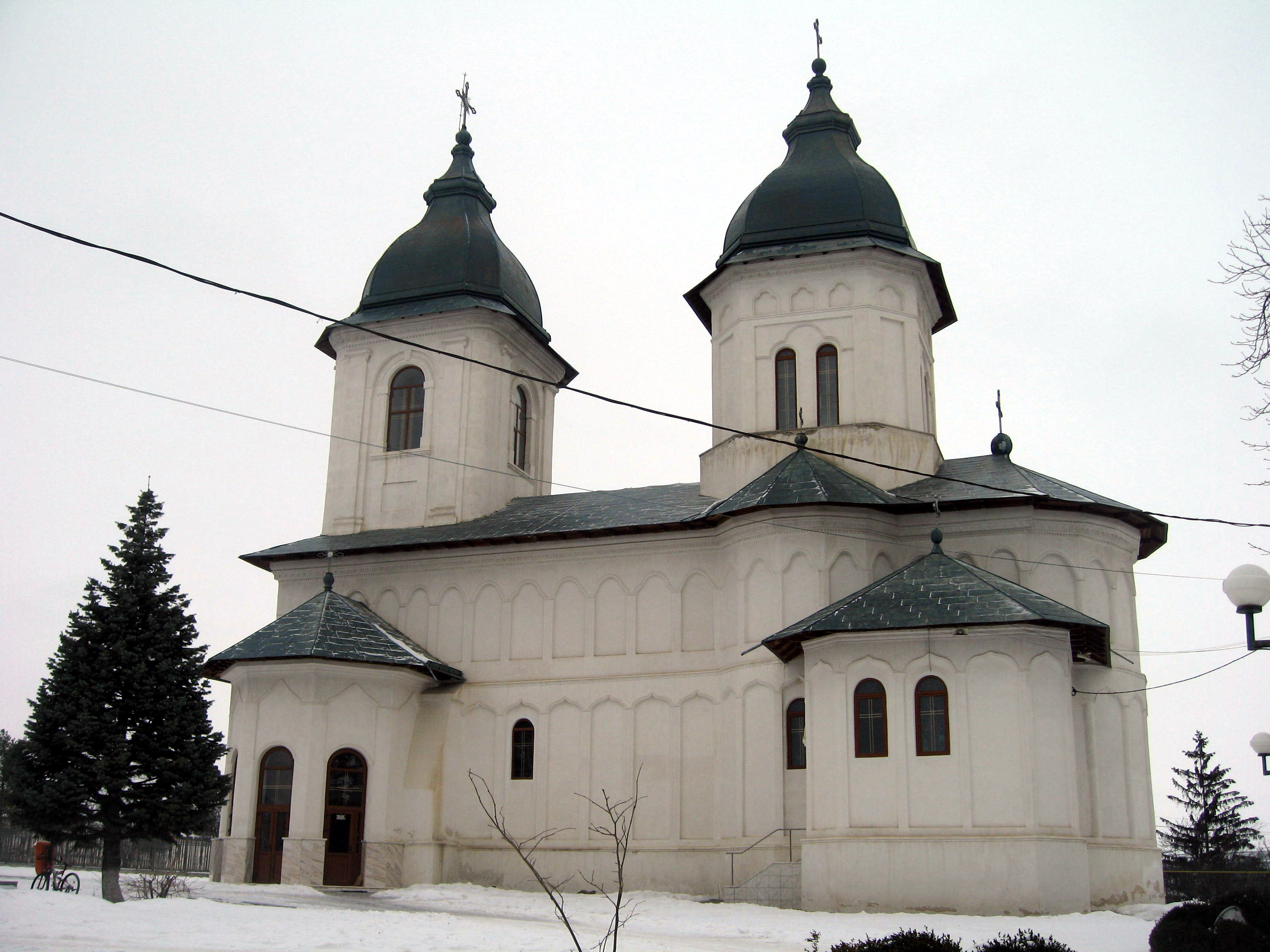 Catedrala din Husi, Vaslui County, Romania